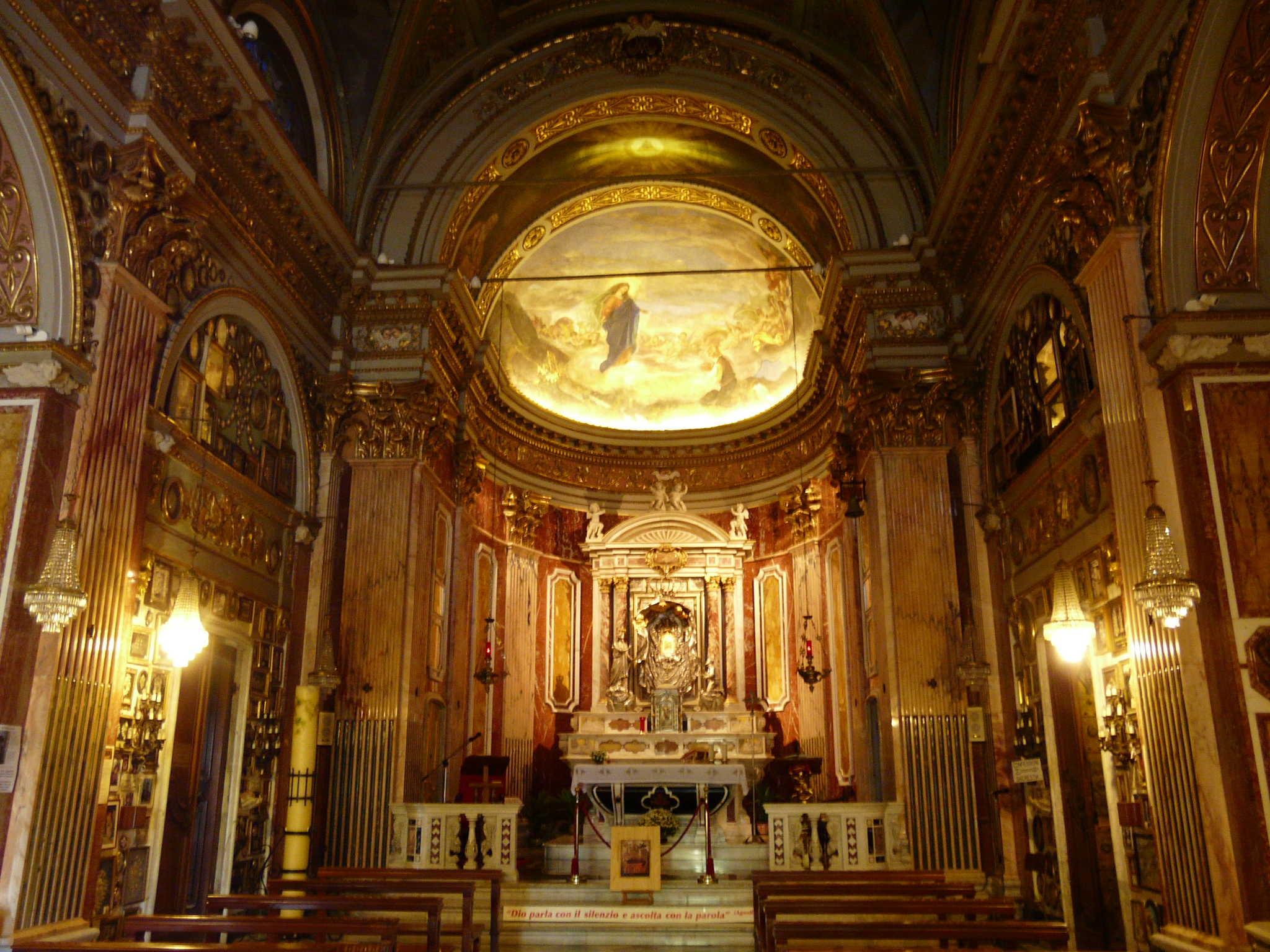 Navata del Santuario di Nostra Signora di Montallegro, Rapallo, Liguria, Italia